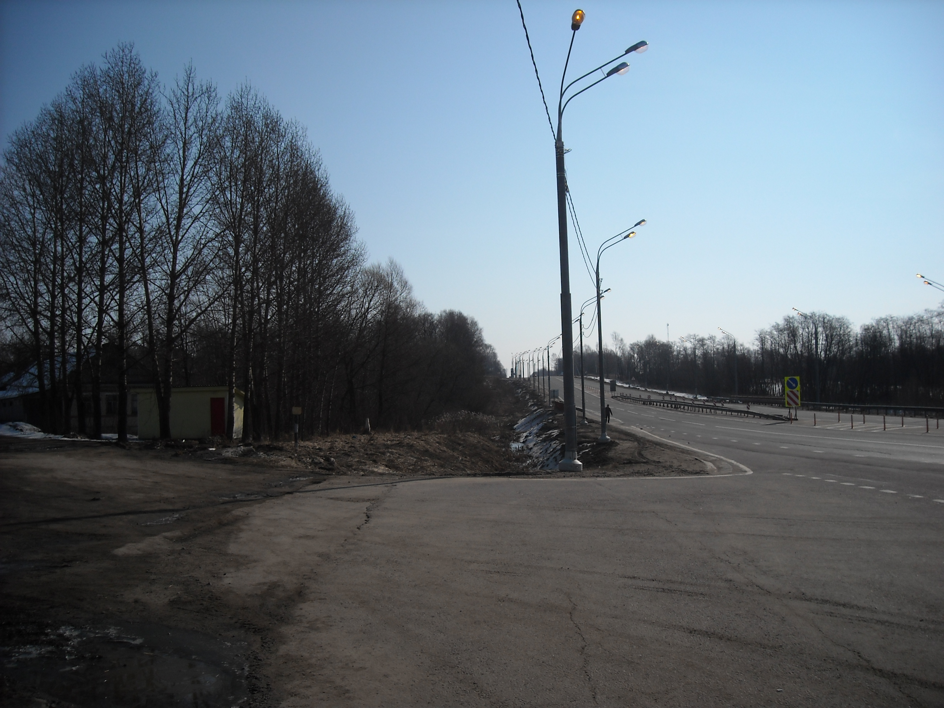 Village Maltsevo in Gagarin district, Smolensk oblast, Russia